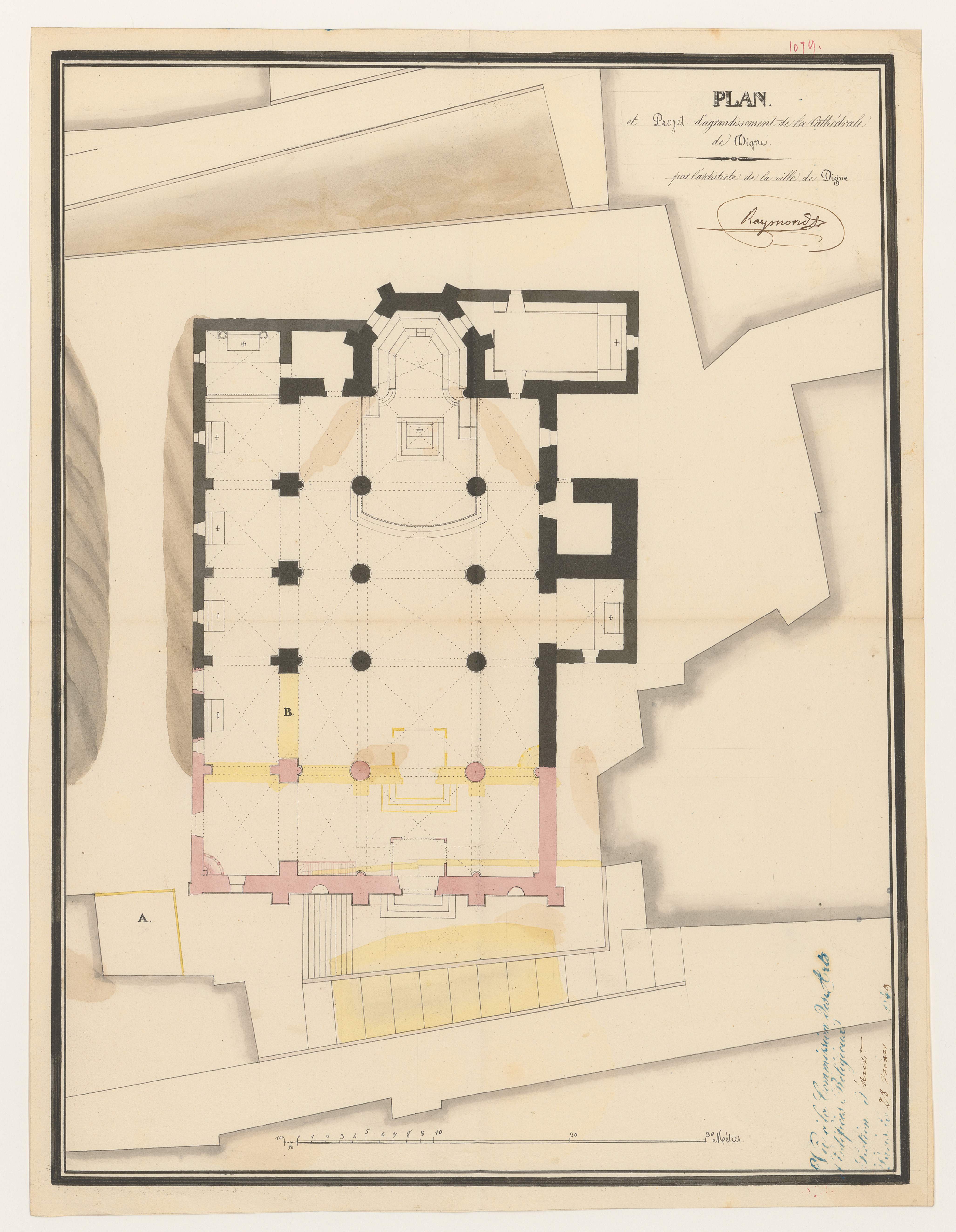 Plan et projet d'agrandissement de la cathédrale de Digne. Plan issu des dossiers de travaux de restauration des cathédrales (1802-1912), conservés aux Archives nationales (inventaire et autres documents numérisés consultables en ligne).